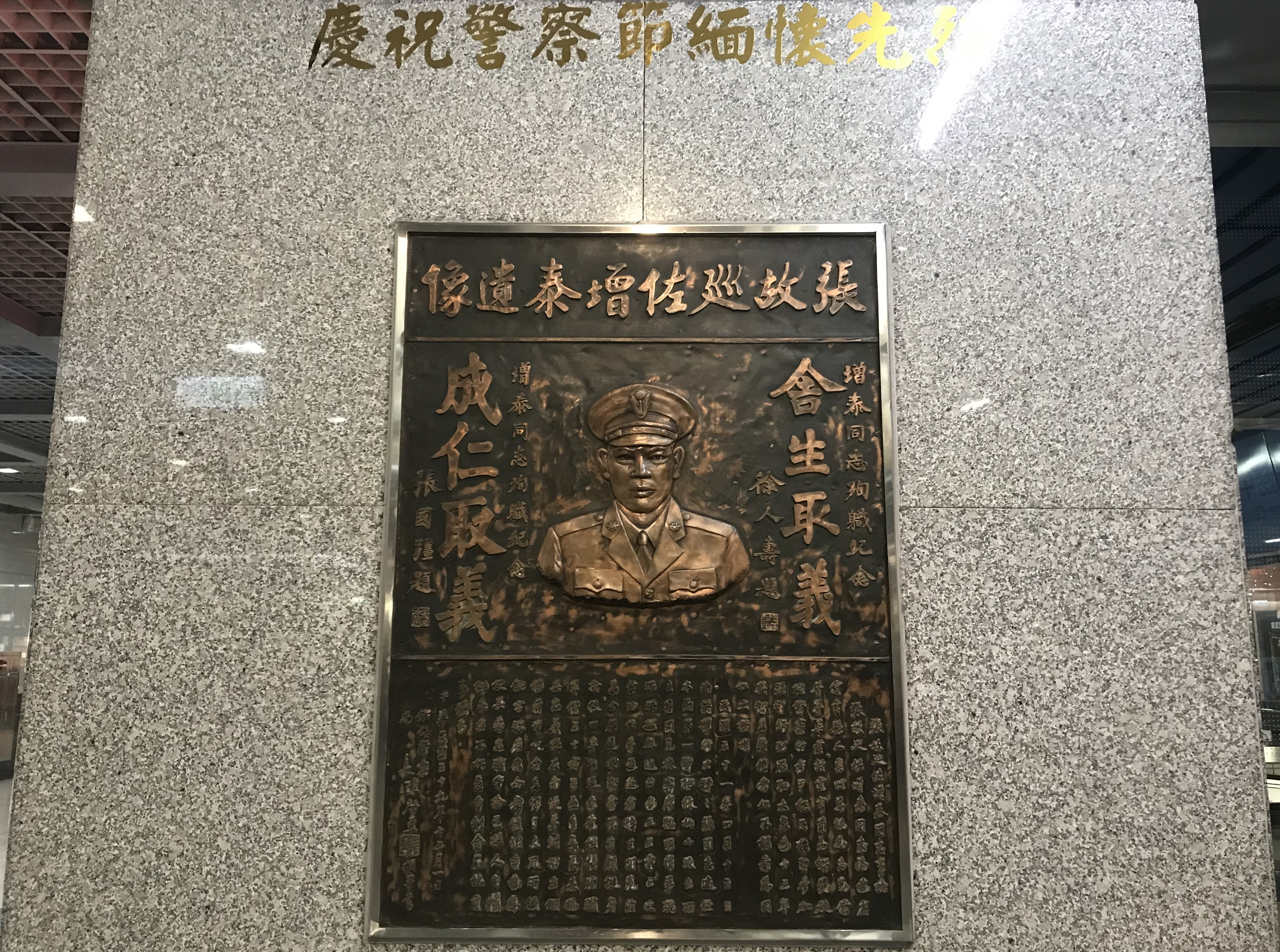 張增泰殉職紀念牌